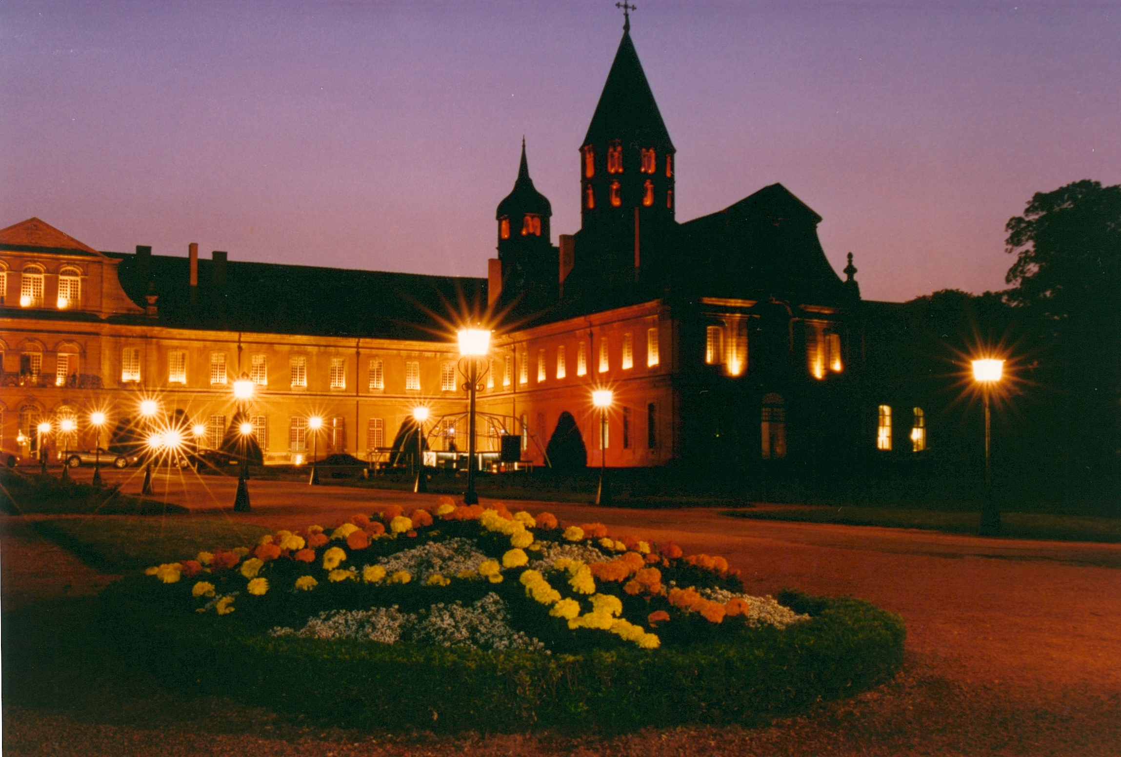 L'abbaye de Cluny pendant le Gala Arts et Métiers Photographie prise par Patrick GIRAUD.